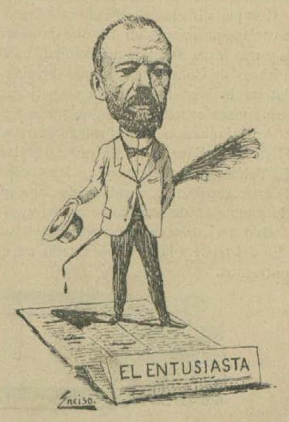 Ramón Caamaño Paz director de El Entusiasta